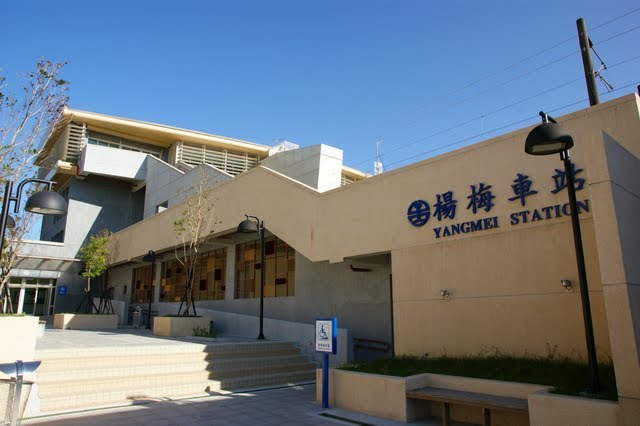 中文（台灣）: 為平衡楊梅前後站之地方發展，在跨站式站房啟用後，正式開放楊梅後站。